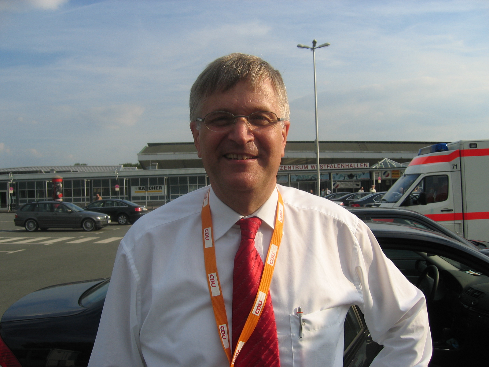 Peter Hintze auf dem Bundesparteitag der CDU-Deutschland